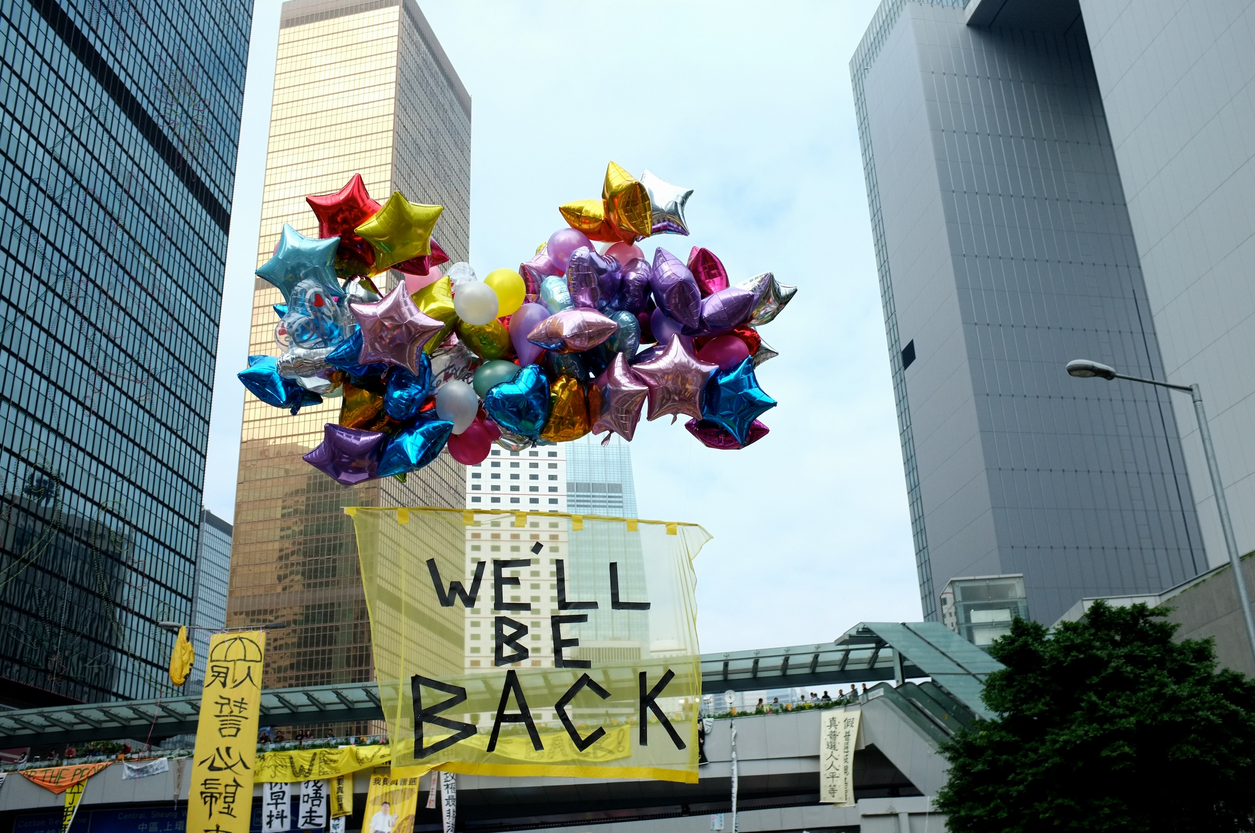 Umbrella Revolution @ Hong Kong 2014